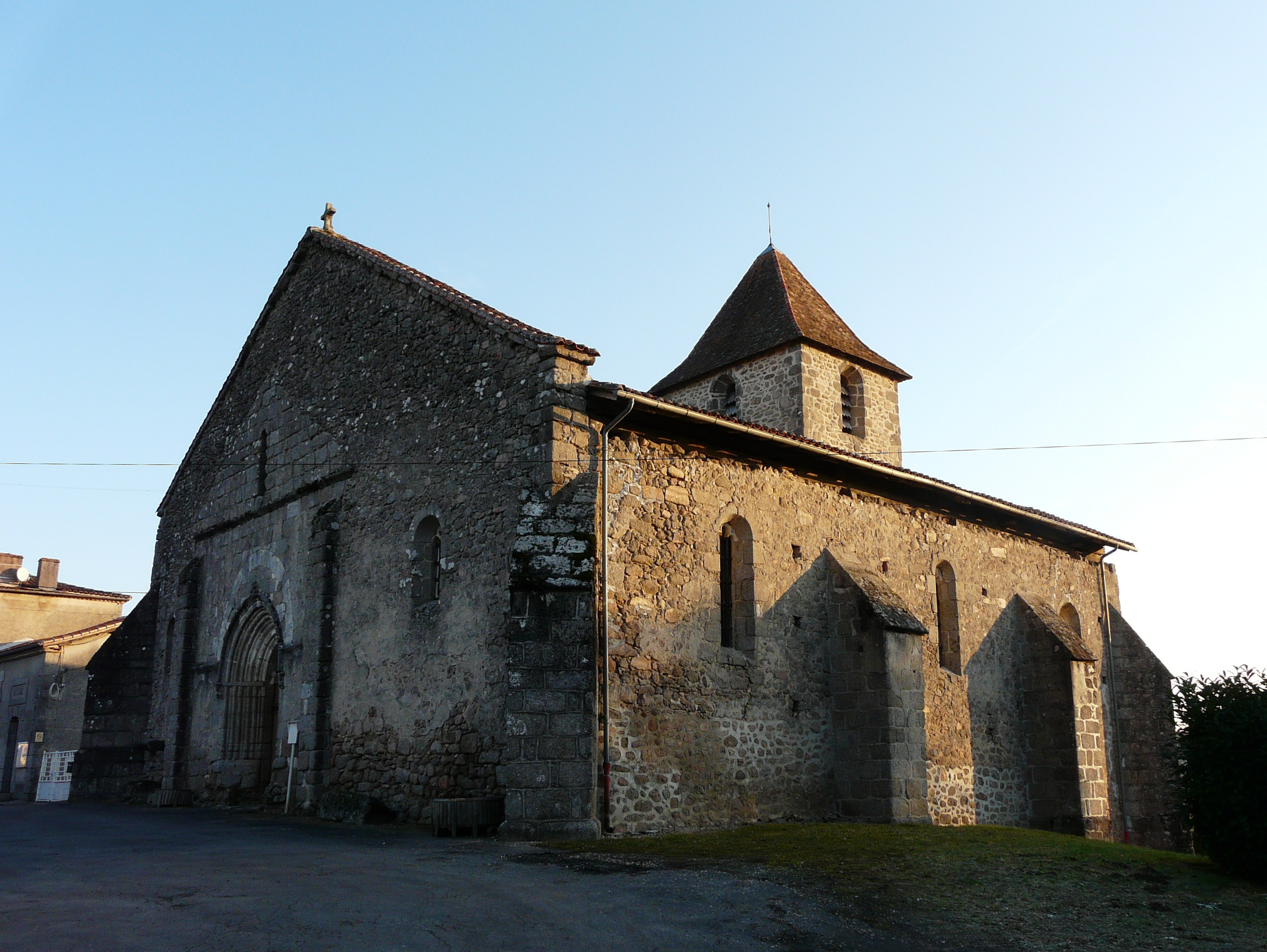 L'église Saint-Étienne vue du sud-ouest, Saint-Estèphe, Dordogne, France.